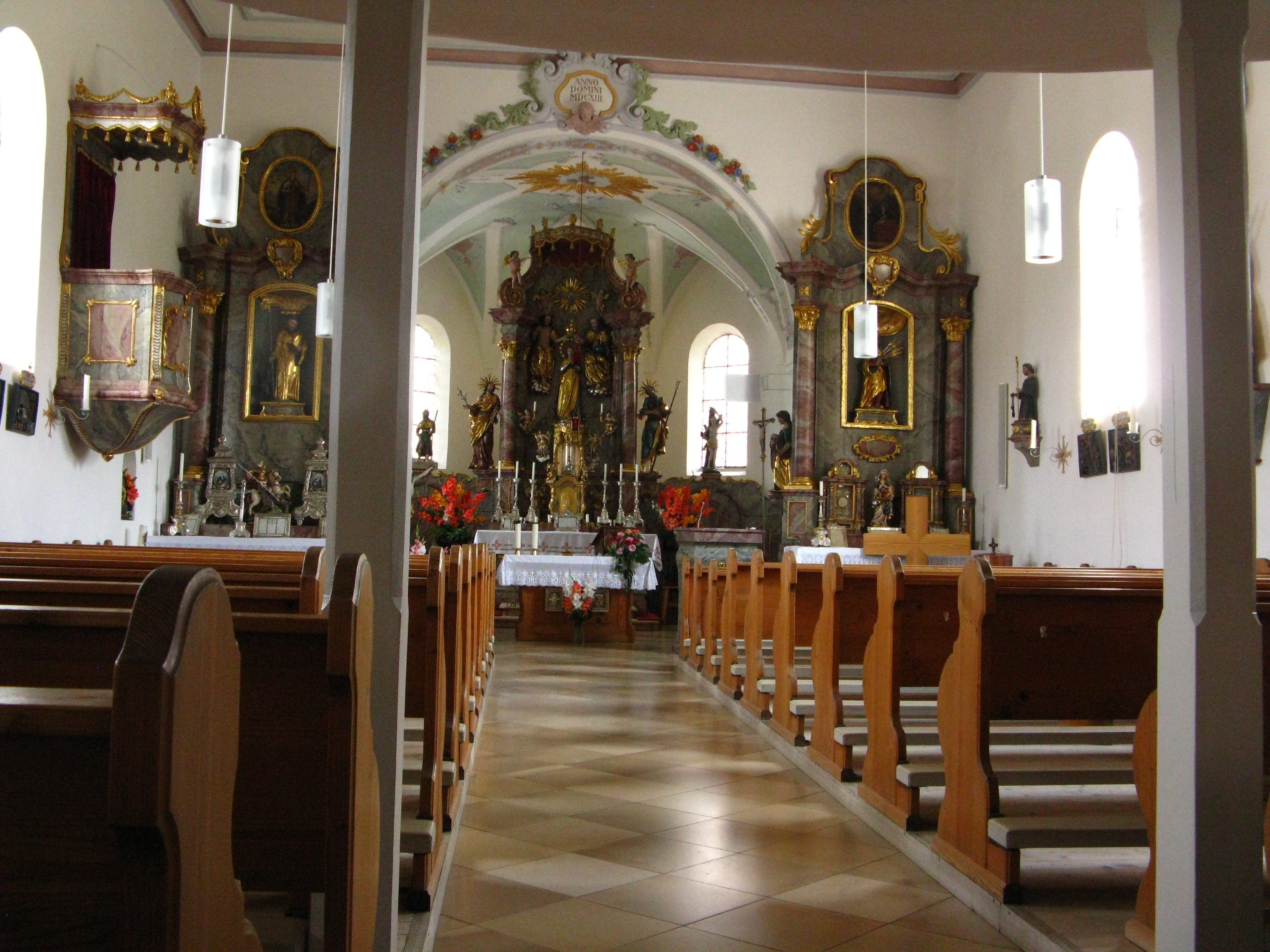 Oberzeitelbach Kirche Maria Himmelfahrt, inneres